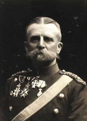 Valdemar Stephan Julius Raabye (1852-1908), Danish general